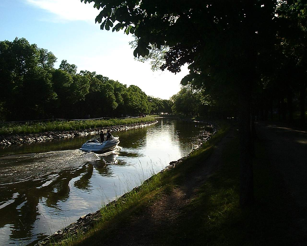 Djurgårdsbrunnskanalen